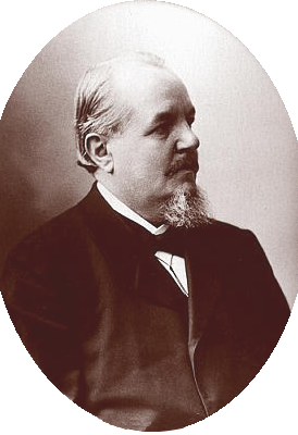 Heinrich Dolmetsch (1846-1908)